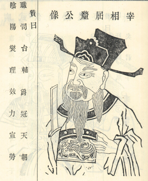 汉丞相刘屈氂像。像取自清光绪修《安徽桐城刘氏宗谱》。